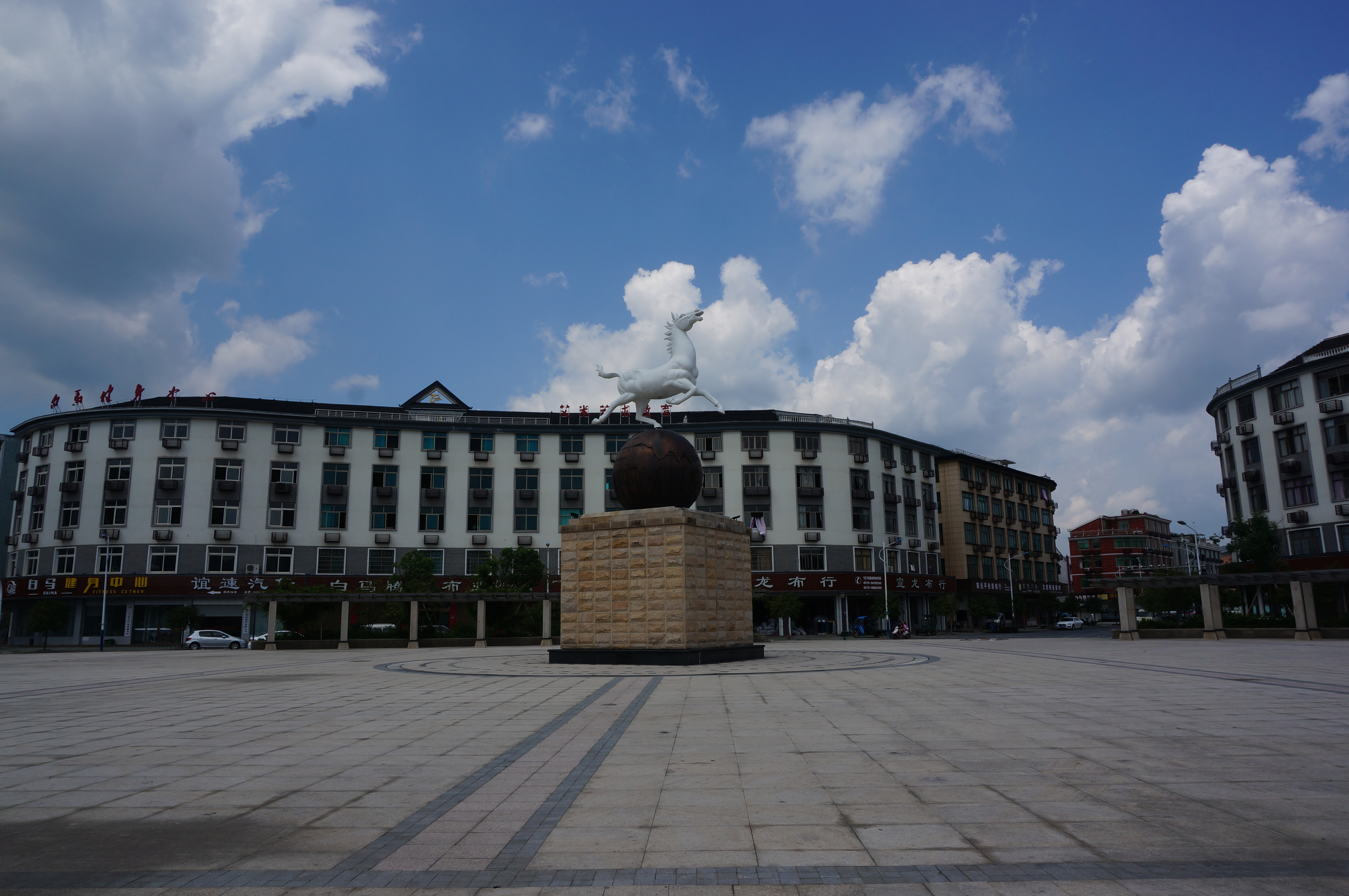 浦江县白马镇白马广场。